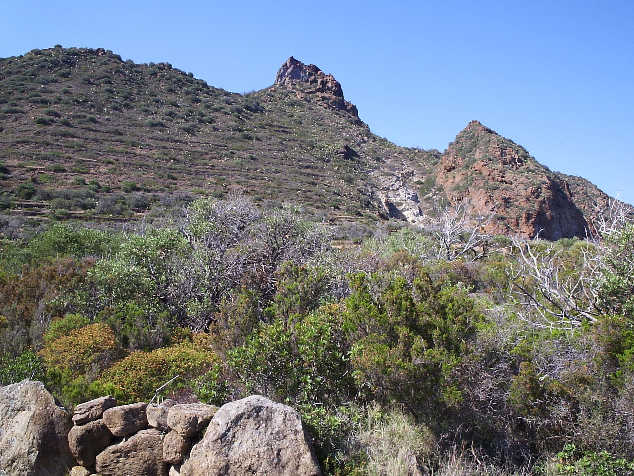 Punta del Tribunale and Castello, dacitic lava domes on Panarea Island